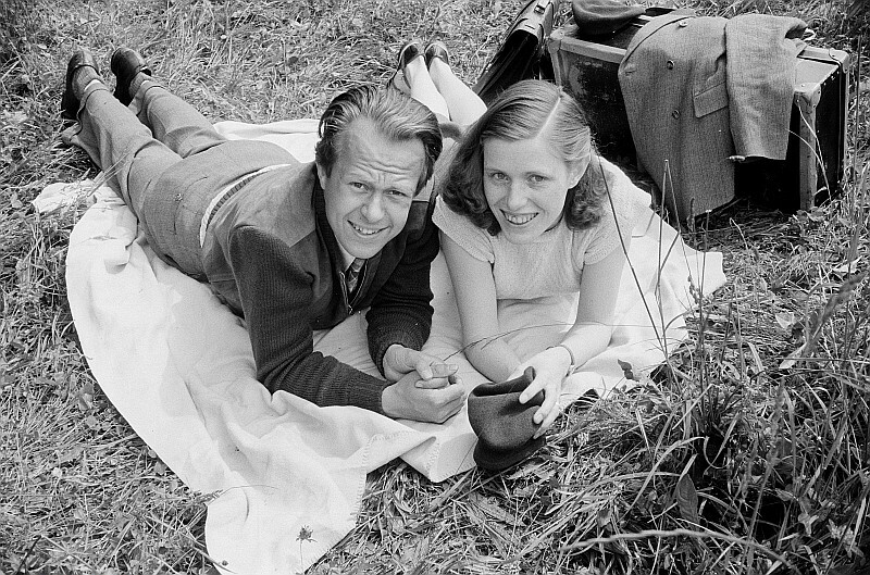 Original image description from the Deutsche Fotothek Renate und Roger Rössing bei einer Rast